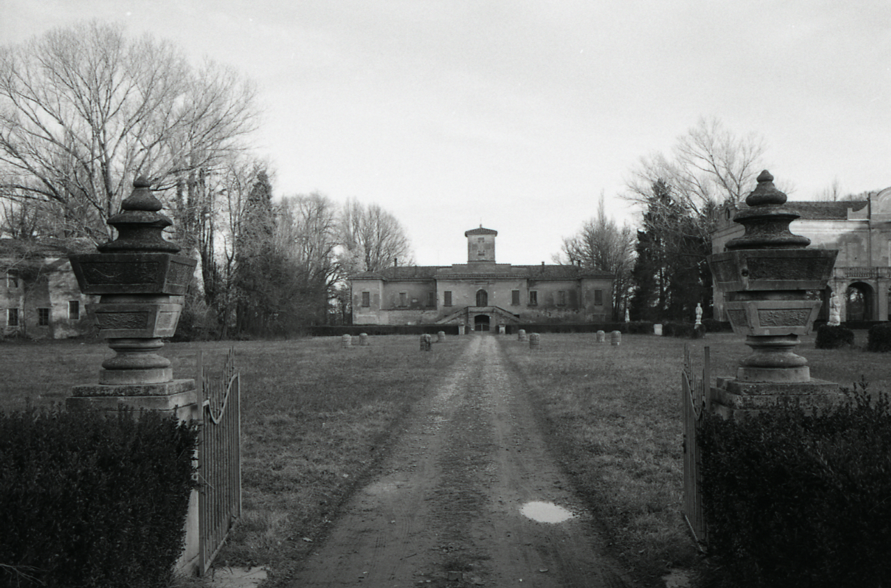 Servizio fotografico : Bologna, 1965 / Paolo Monti. - Strisce: 2, Fotogrammi complessivi: 7 : Negativo b/n, gelatina bromuro d'argento/ pellicola ; 35 mm. - ((I fotogrammi hanno una doppia numerazione. - Sul portanegativi: Leica Agfa 21. - Occasione: Pubblicazione: "Emilio CECCHI, Natalino SAPEGNO (a cura di), Storia della Letteratura Italiana, 9 voll., Milano, Garzanti, 1966 e segg."